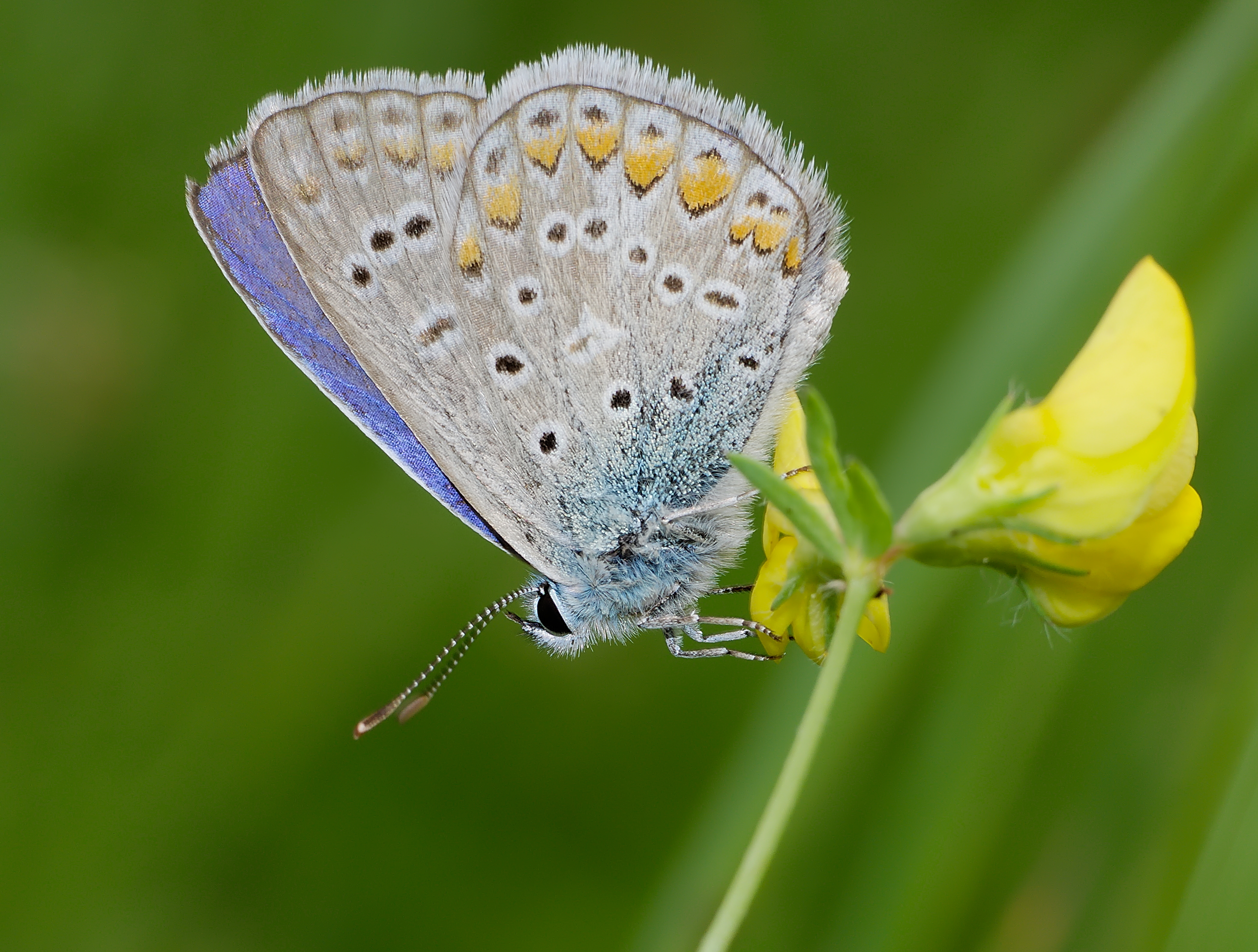 Hauhechel-Bläuling - Polyommatus icarus, Männchen. Aufgenommen in Ladenburg am Kanzelbach, Baden-Württemberg, Deutschland.